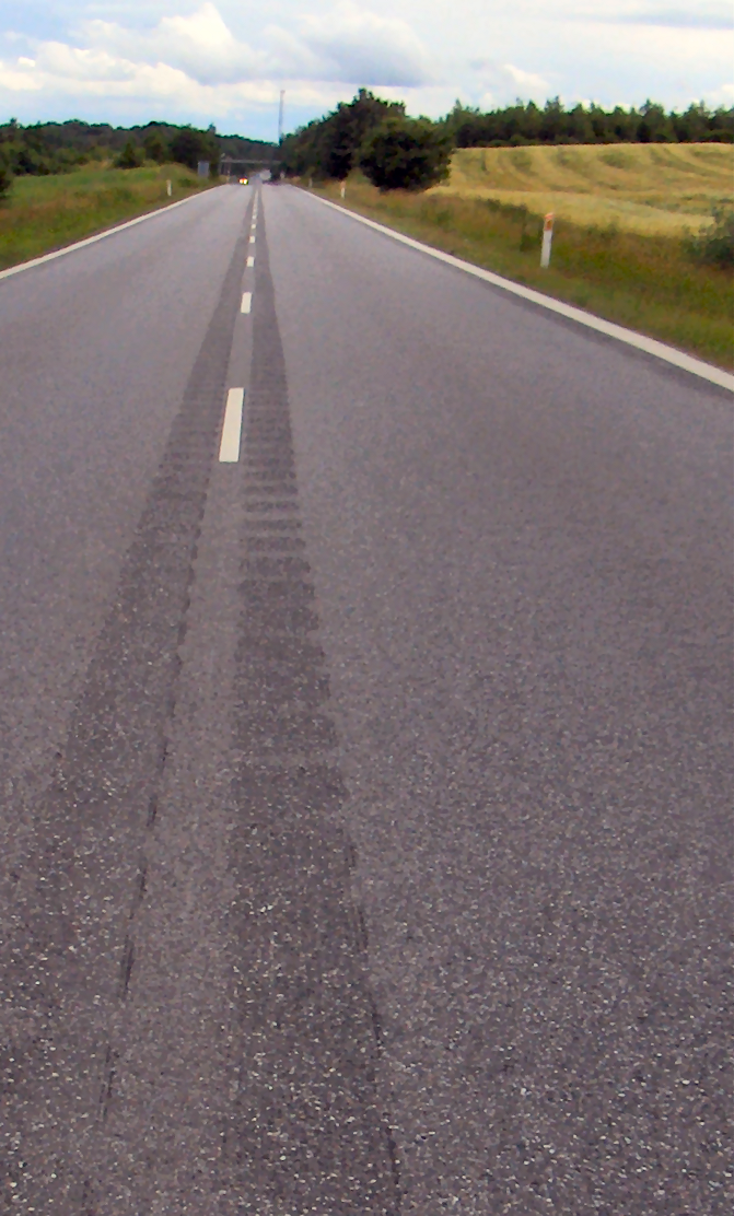 Rumleriller på primærrute 6 i DK